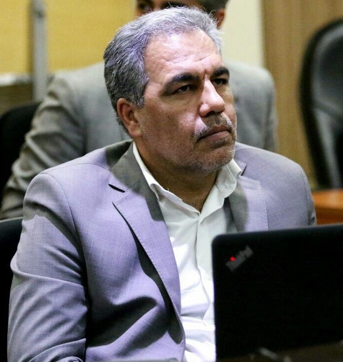 ایرج عرب در نشست هم‌اندیشی خصوصی‌سازی باشگاه پرسپولیس